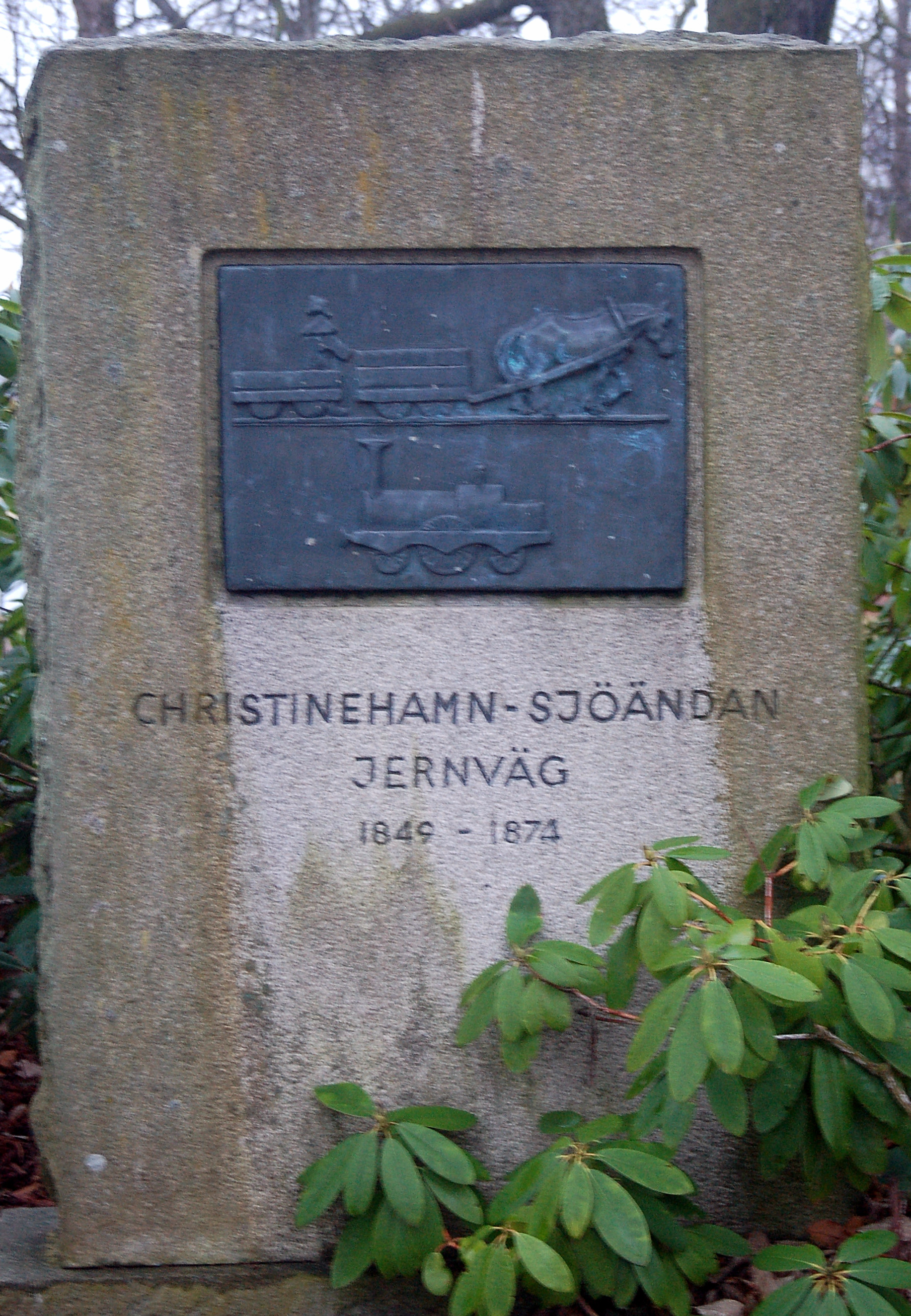 Minnesten för Christinehamn-Sjöändan Jernväg 1849-1873 utfört av Bengt Everhall 1961